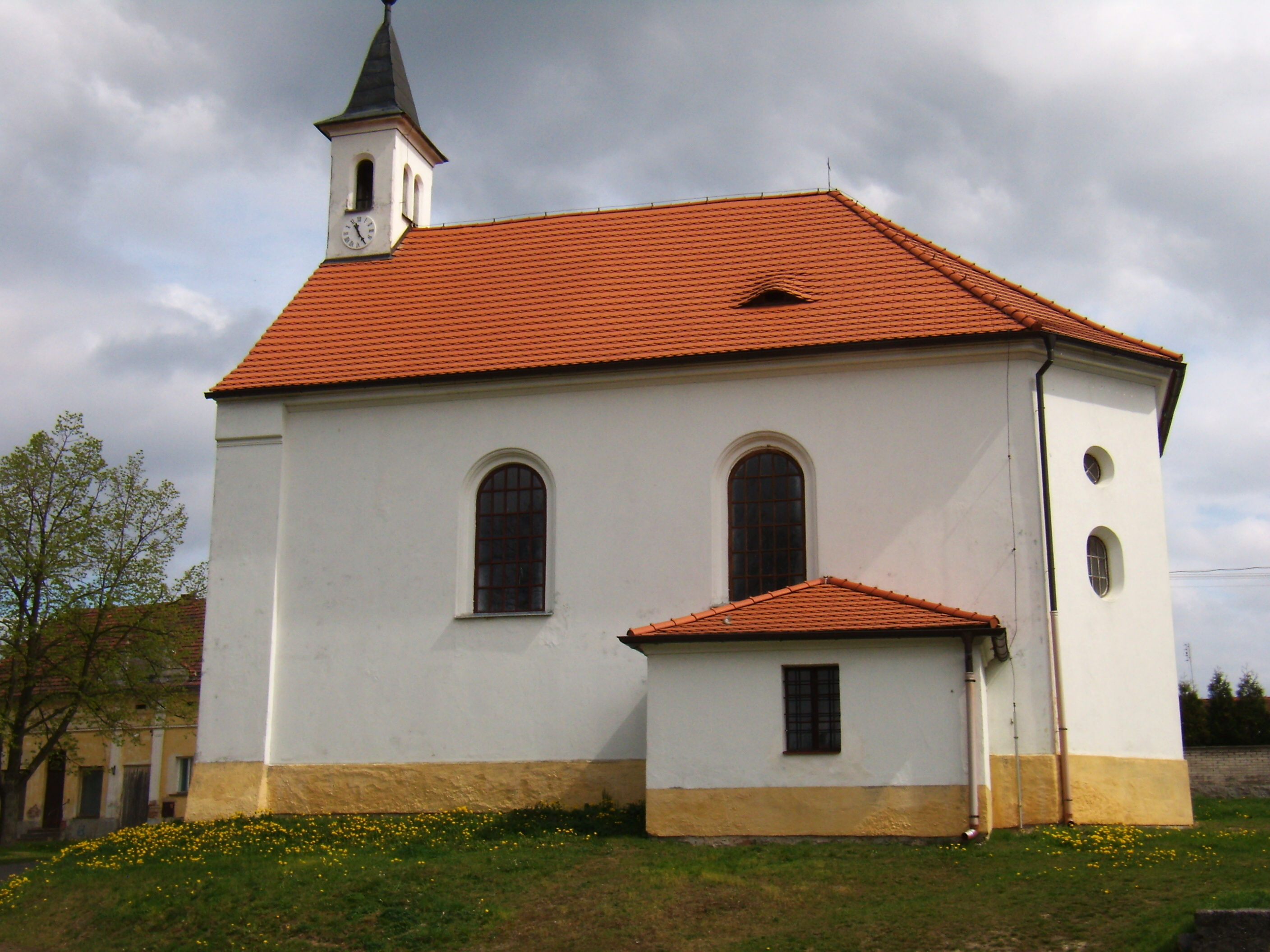 Oplot - kaple Panny Marie